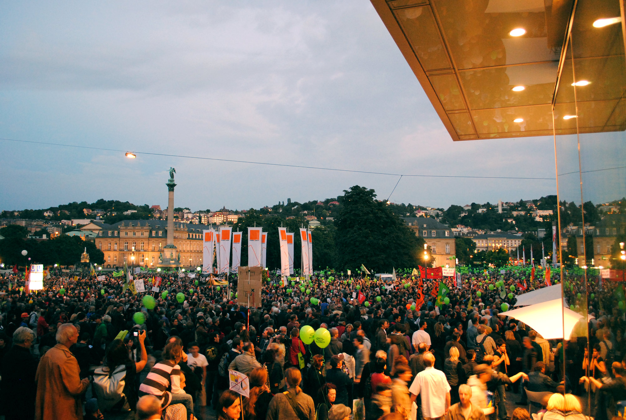 Kundgebung gegen Stuttgart 21 am 10. September 2010, Schlossplatz, Stuttgart